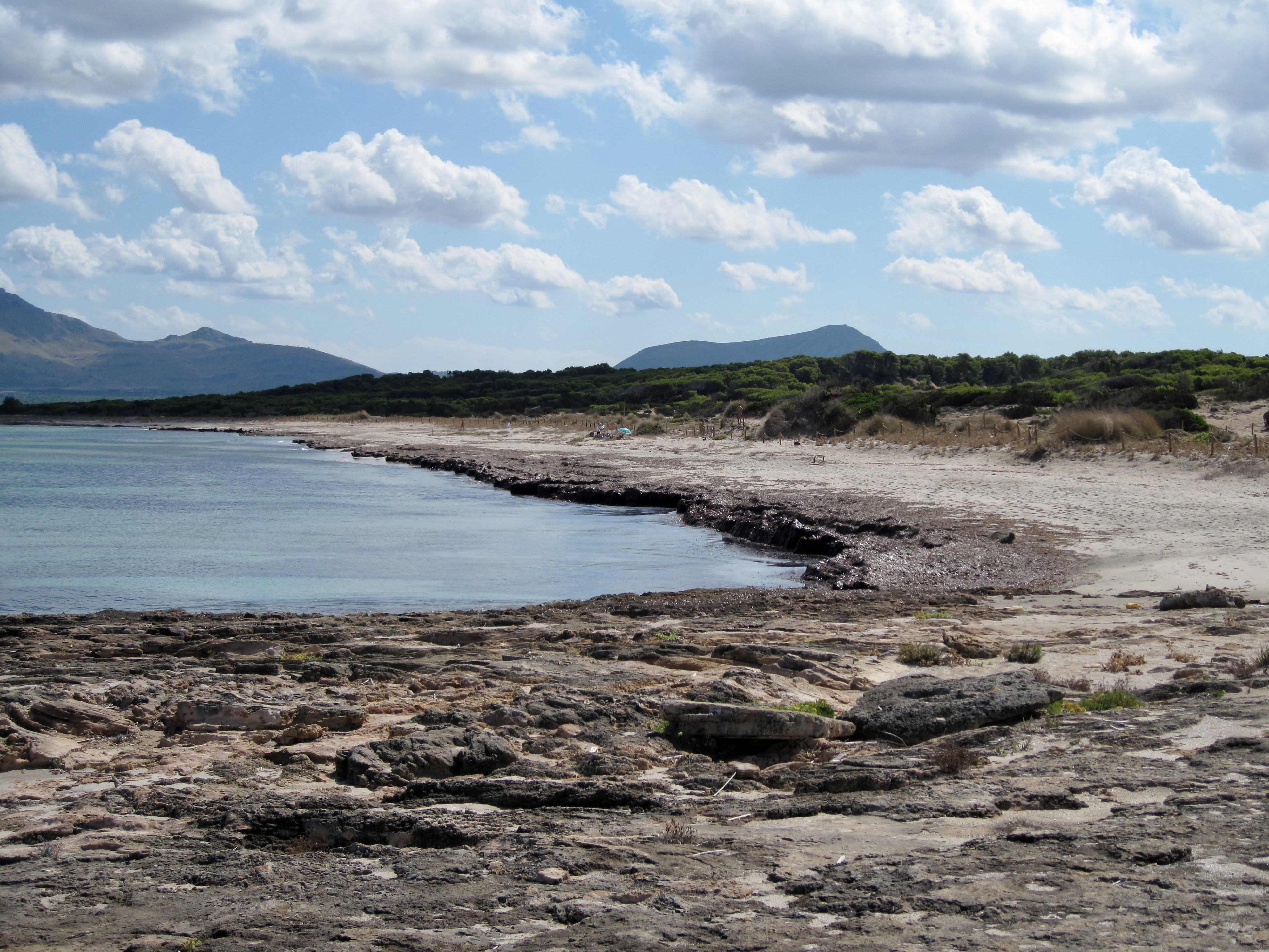 Strand von S’Arenal d’en Casat an der Küste der Gemeinde Santa Margalida, Mallorca, Spanien